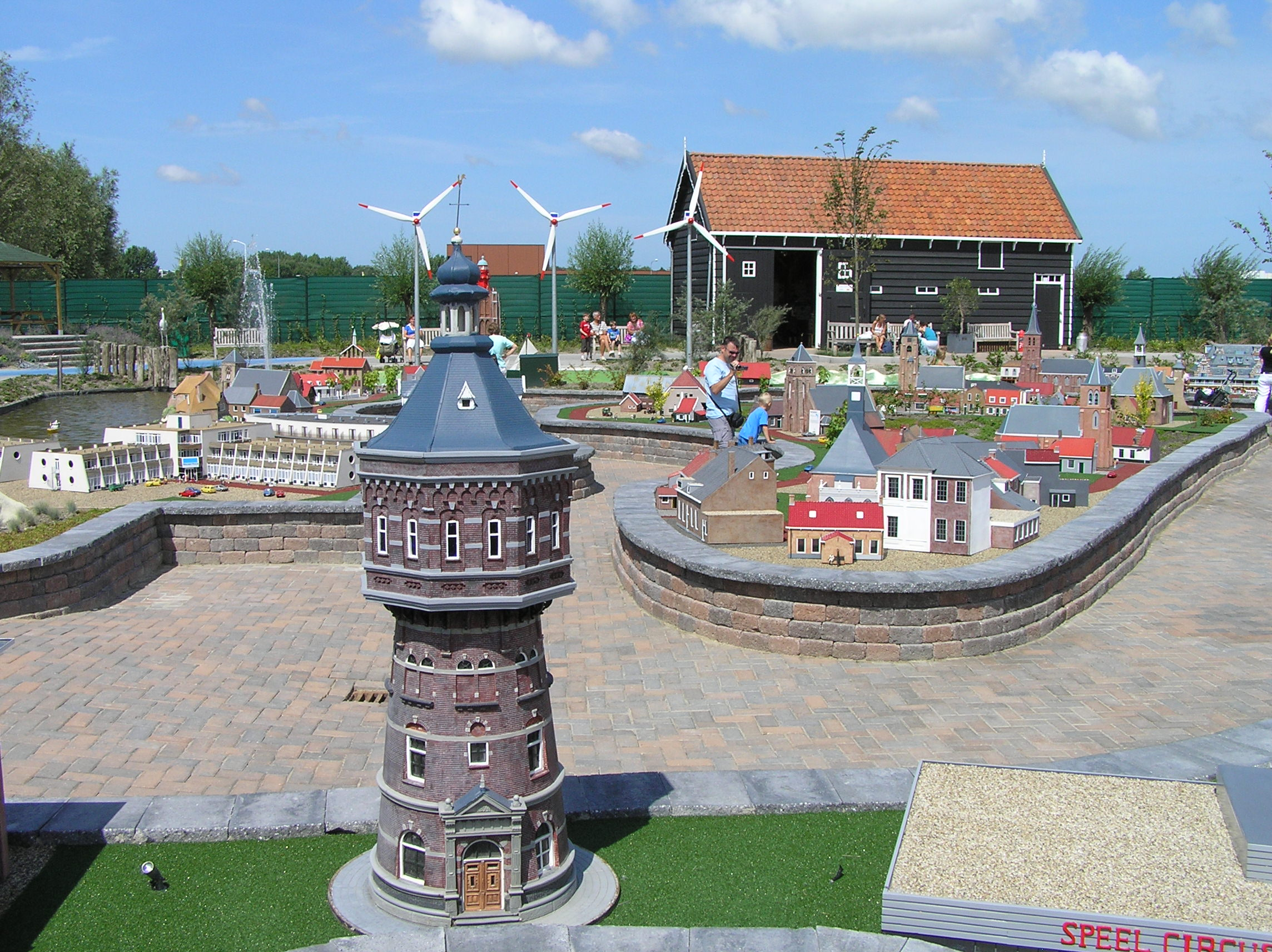 Watertoren van Vlissingen op Mini Mundi - Miniatuur Walcheren